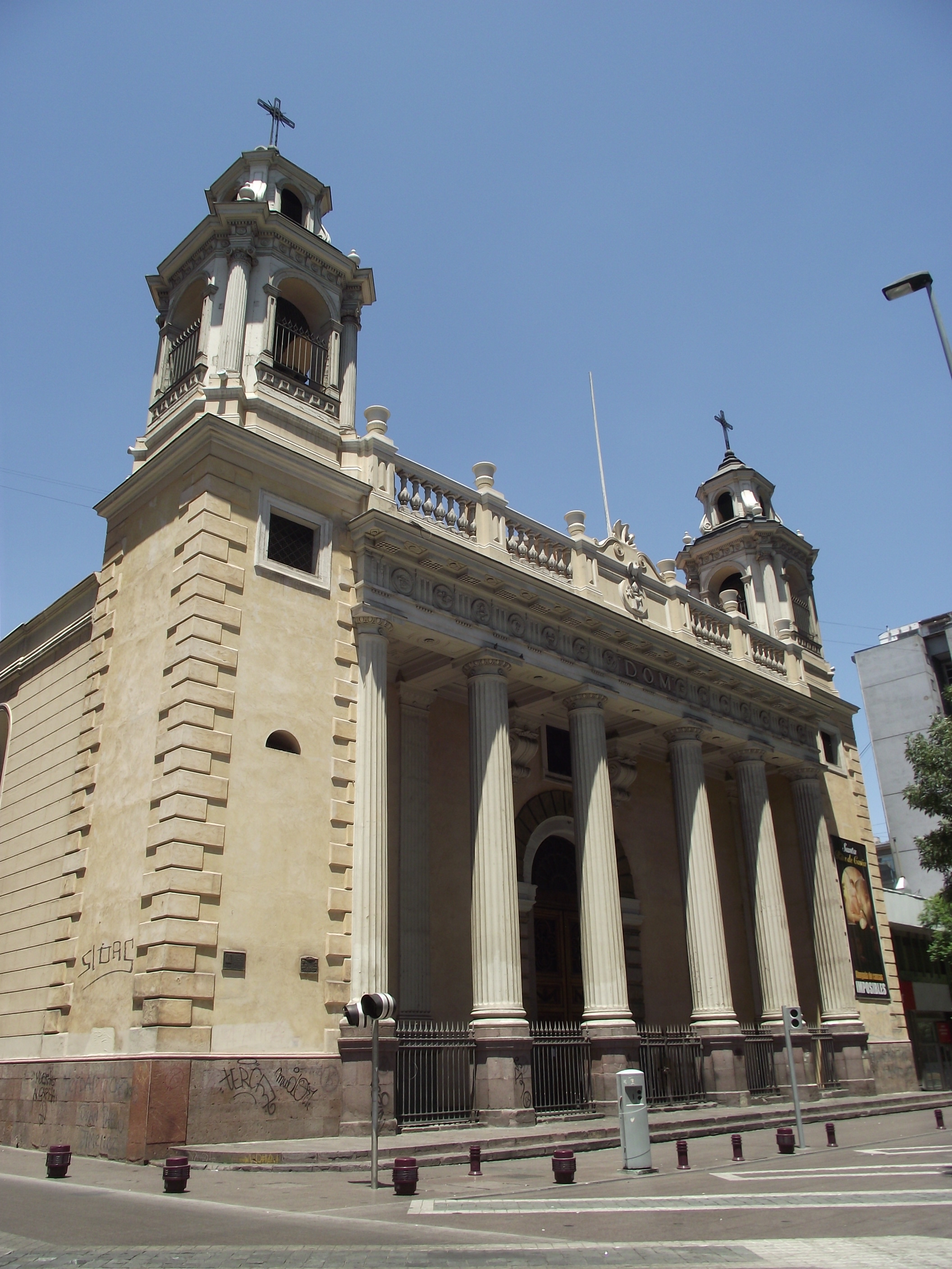 Iglesia de San Agustín, ubicada en el centro de Santiago de Chile